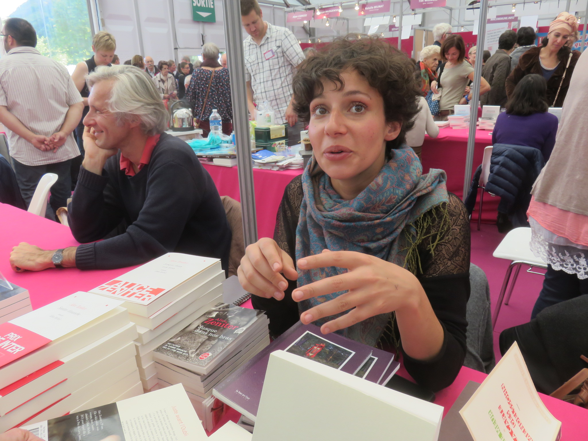 Alice Zeniter, au salon littéraire Les Mots Doubs de Besançon 2015